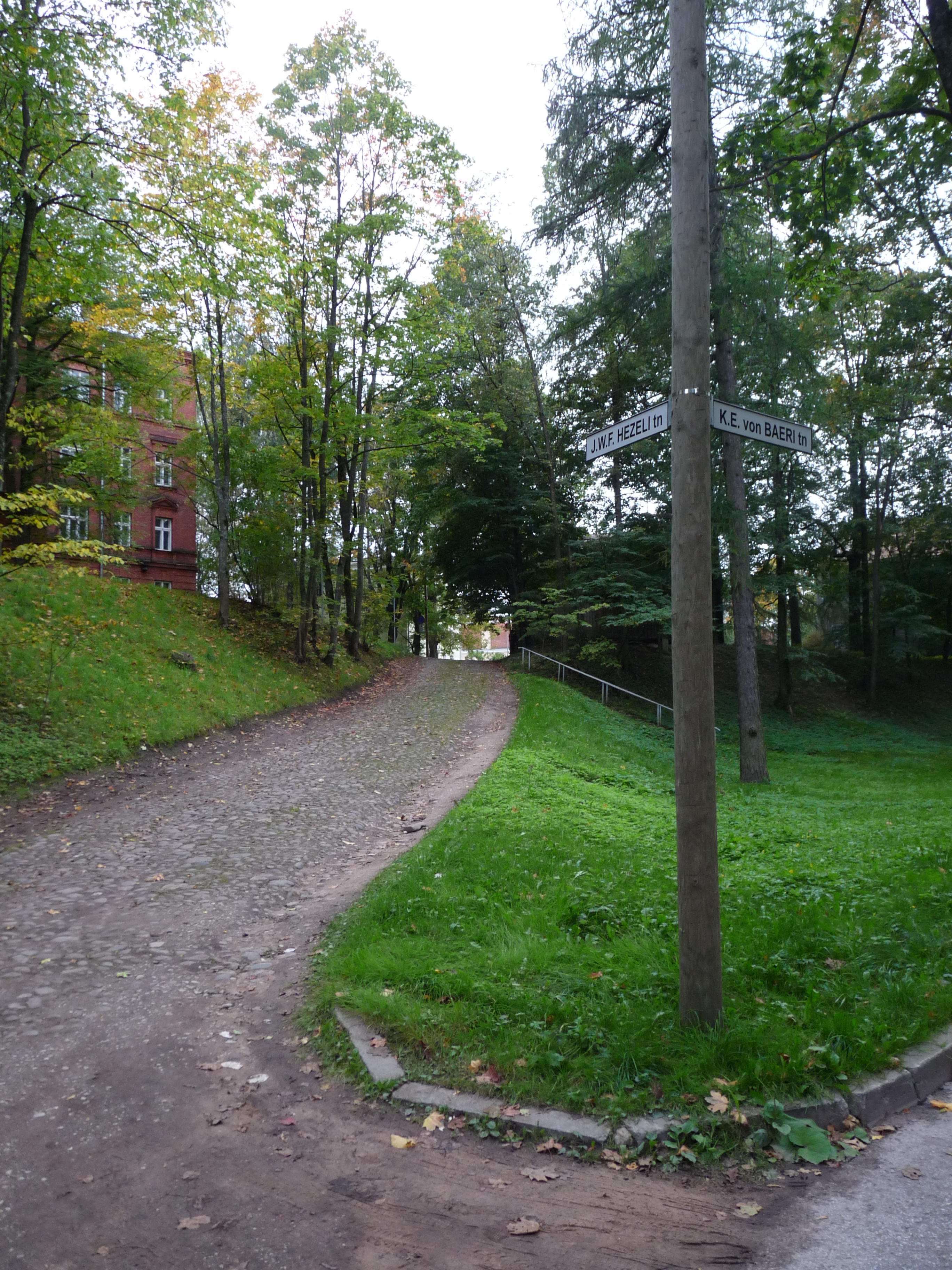 Hezeli ja Baeri tänava nurk Tartus, 22. september 2012